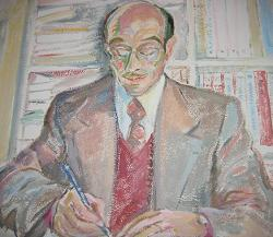 Foto d'un autoretrat del poeta Roc Llop i Convalia